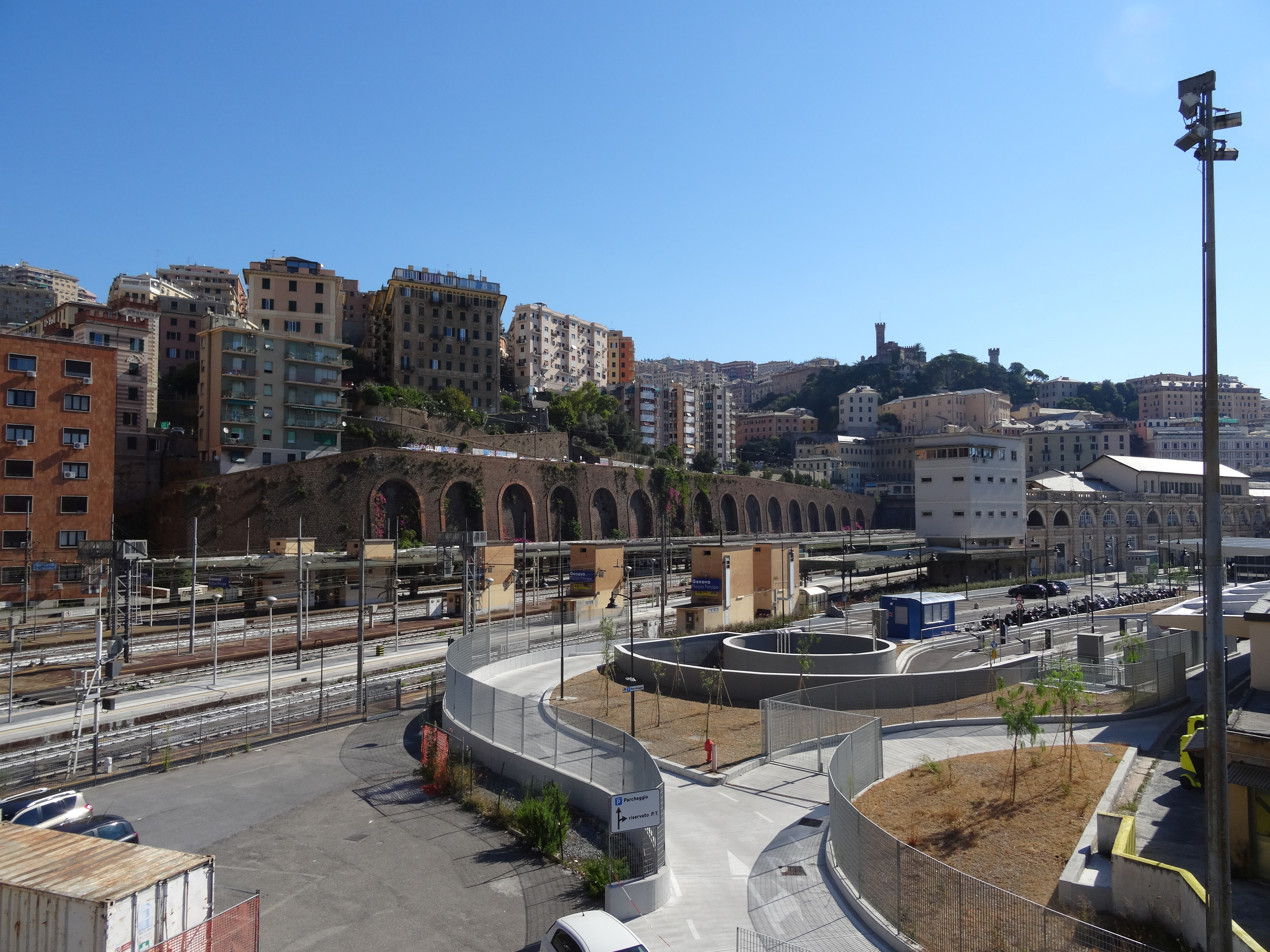 20160814 001 Genova - Genua - Piazza del Principe